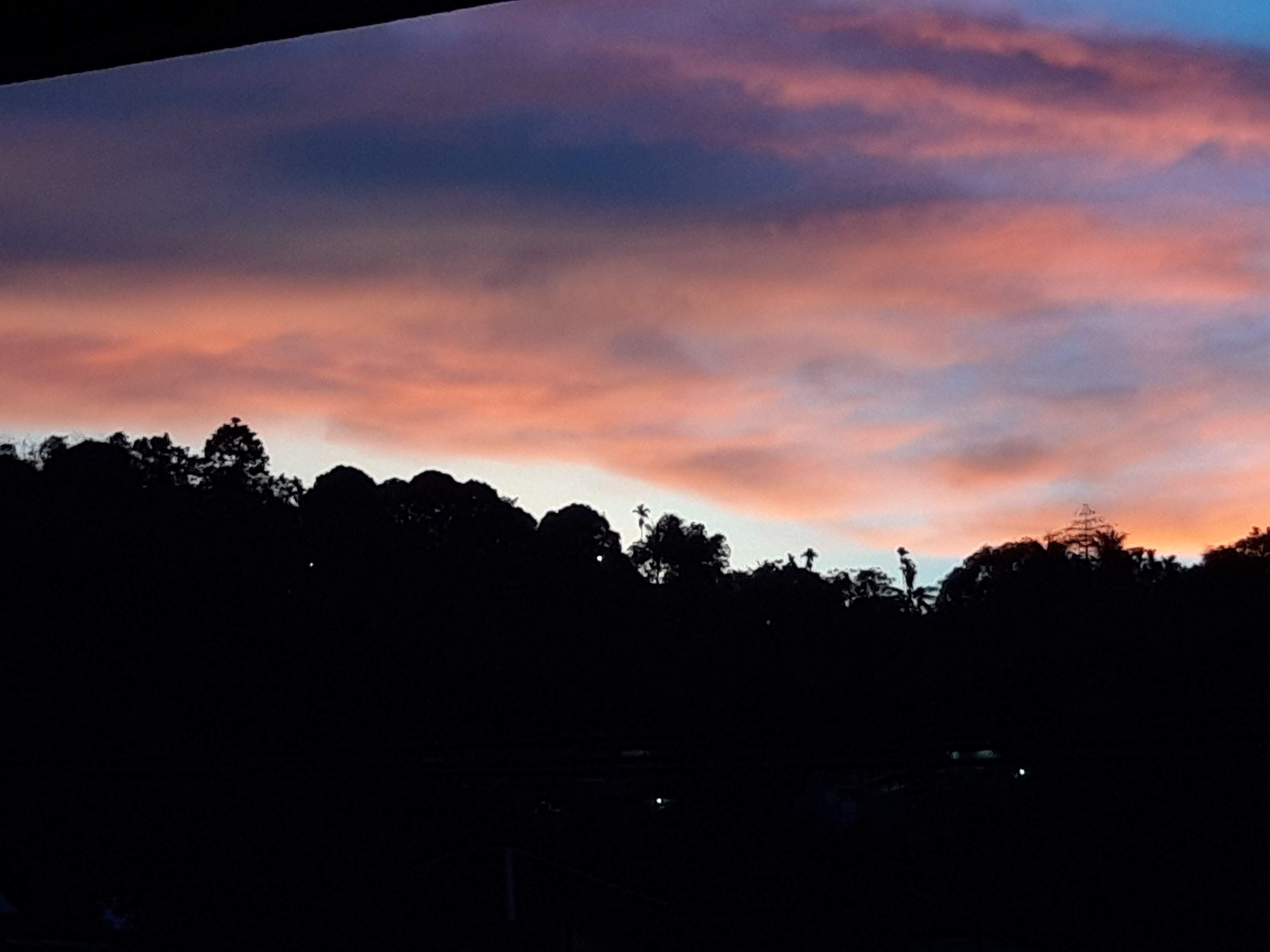 Gambar menunjukkan pemandangan langit saat senja hari di entrop, bagian selatan kota Jayapura, Papua.